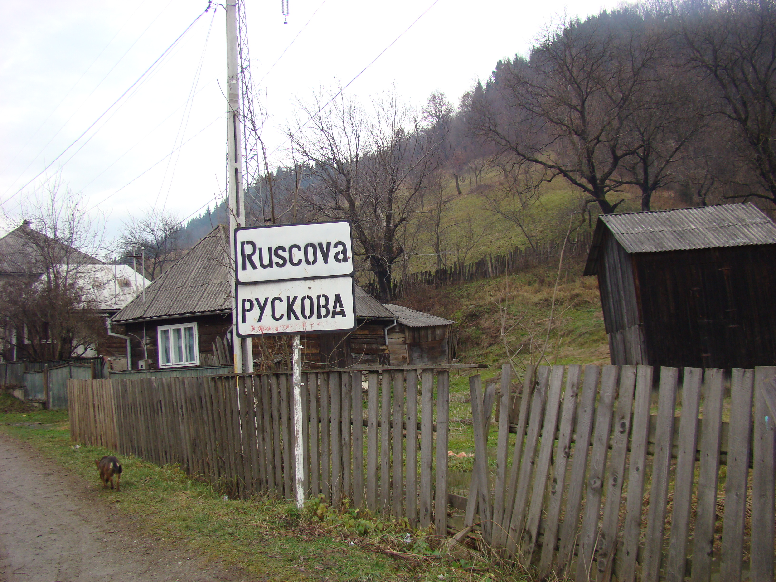 Ruscova, județul Maramureș